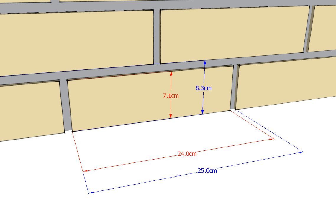 Skizze zur Erläuterung von Baurichtmaß und Baunennmaß